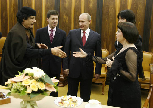 Председатель Правительства России В.В.Путин и находящийся в Москве с визитом Руководитель ливийской революции Муамар Каддафи посетили концерт французской певицы Мирей Матье в Государственном Кремлевском дворце